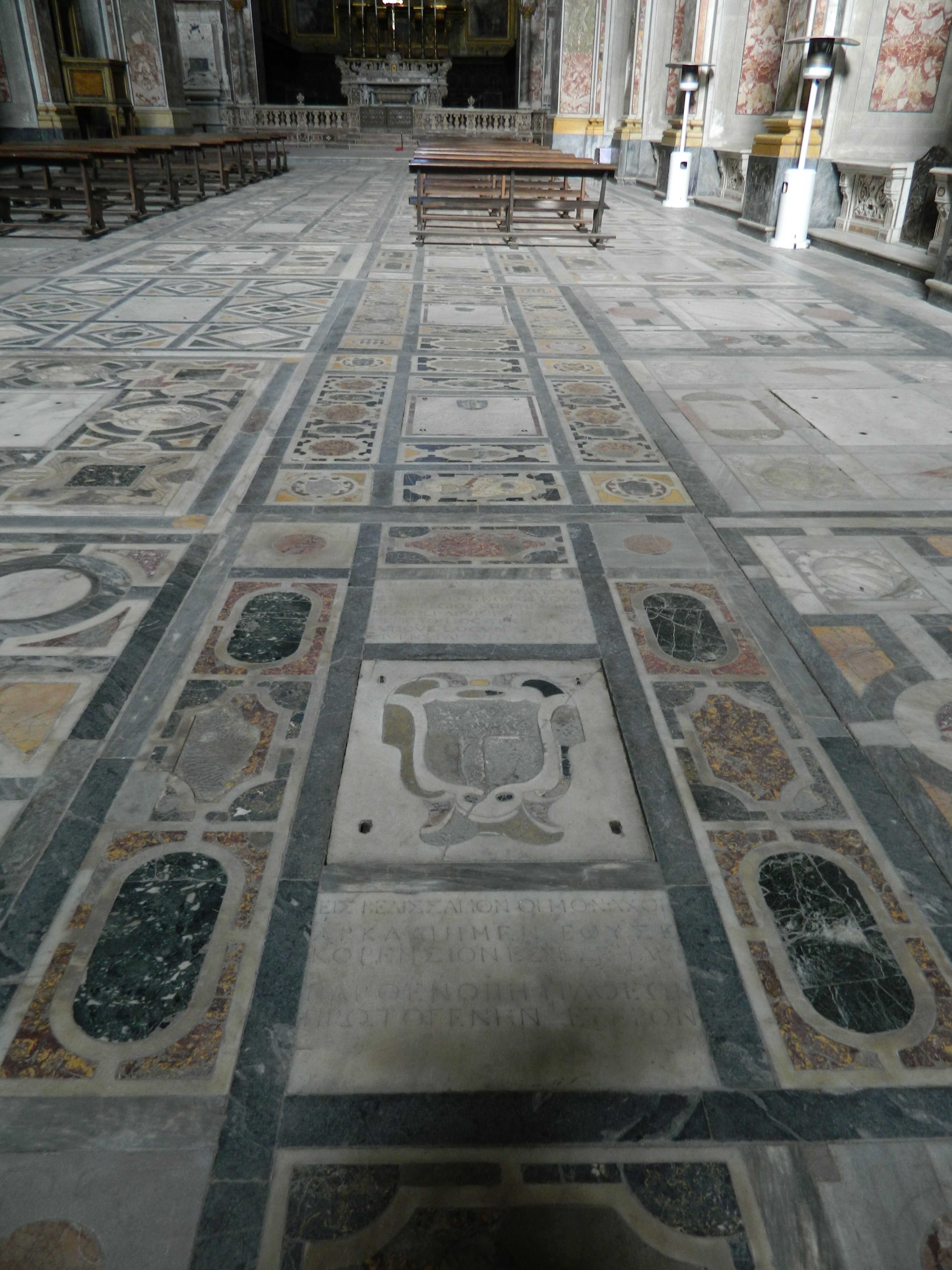 Pavimento (particolare della tomba di Belisario Corenzio) - Chiesa dei santi Severino e Sossio di Napoli